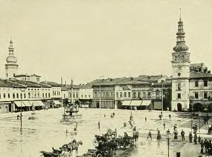 Hlavní náměstí (nynější Masarykovo náměstí), vpravo stará radnice